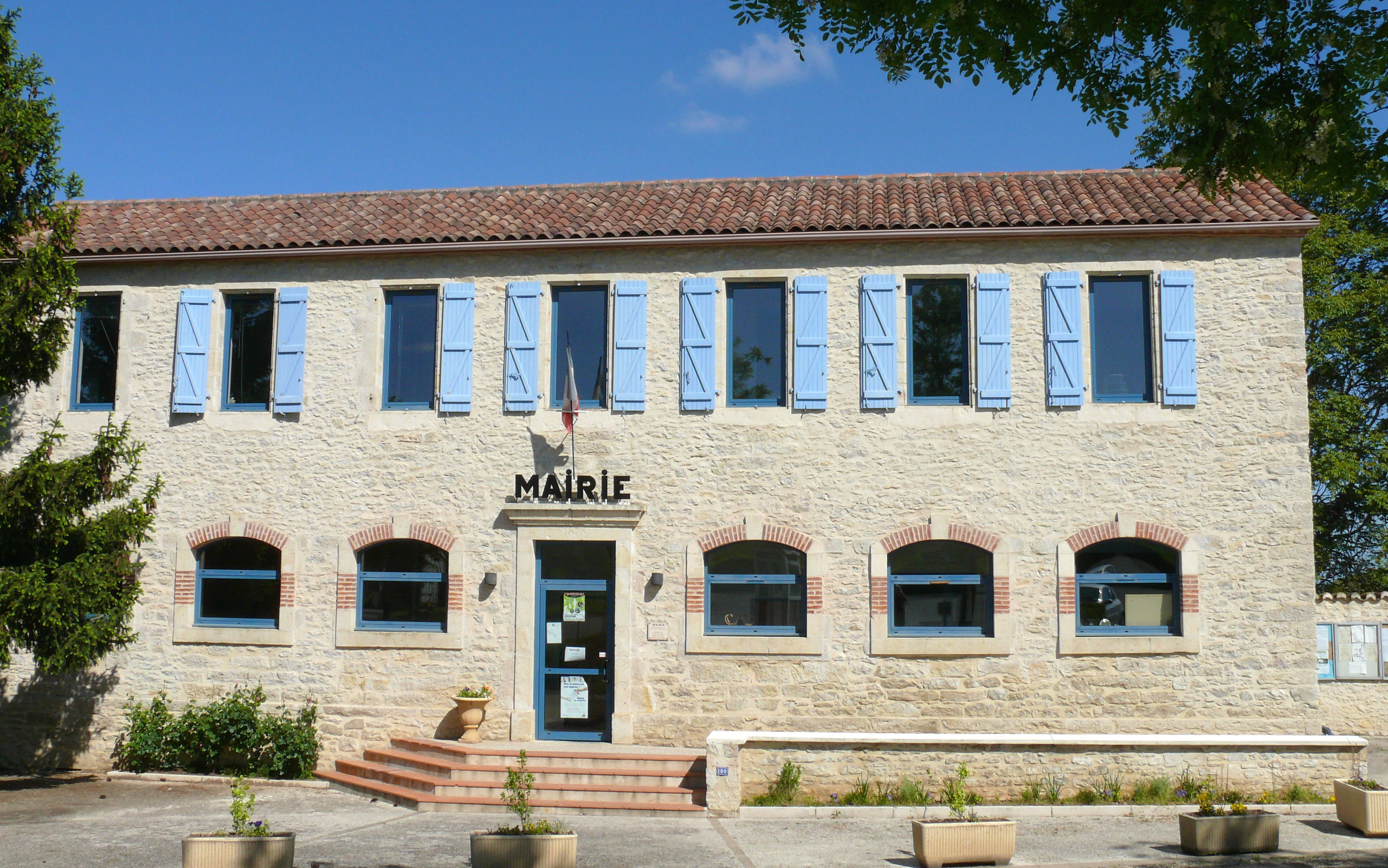 Le Montat - Mairie